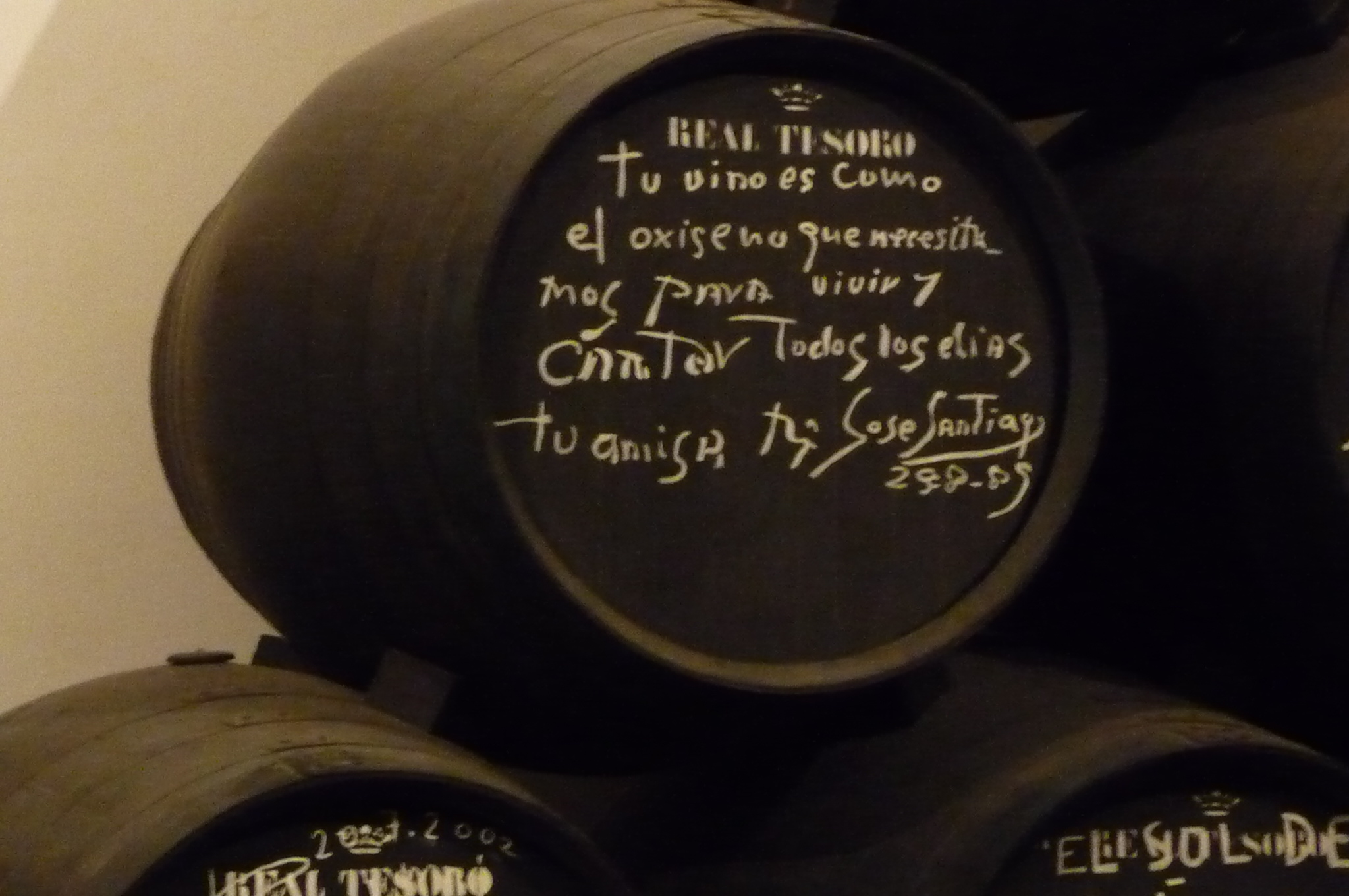 MariaJose-Santiago-p1000034.jpg